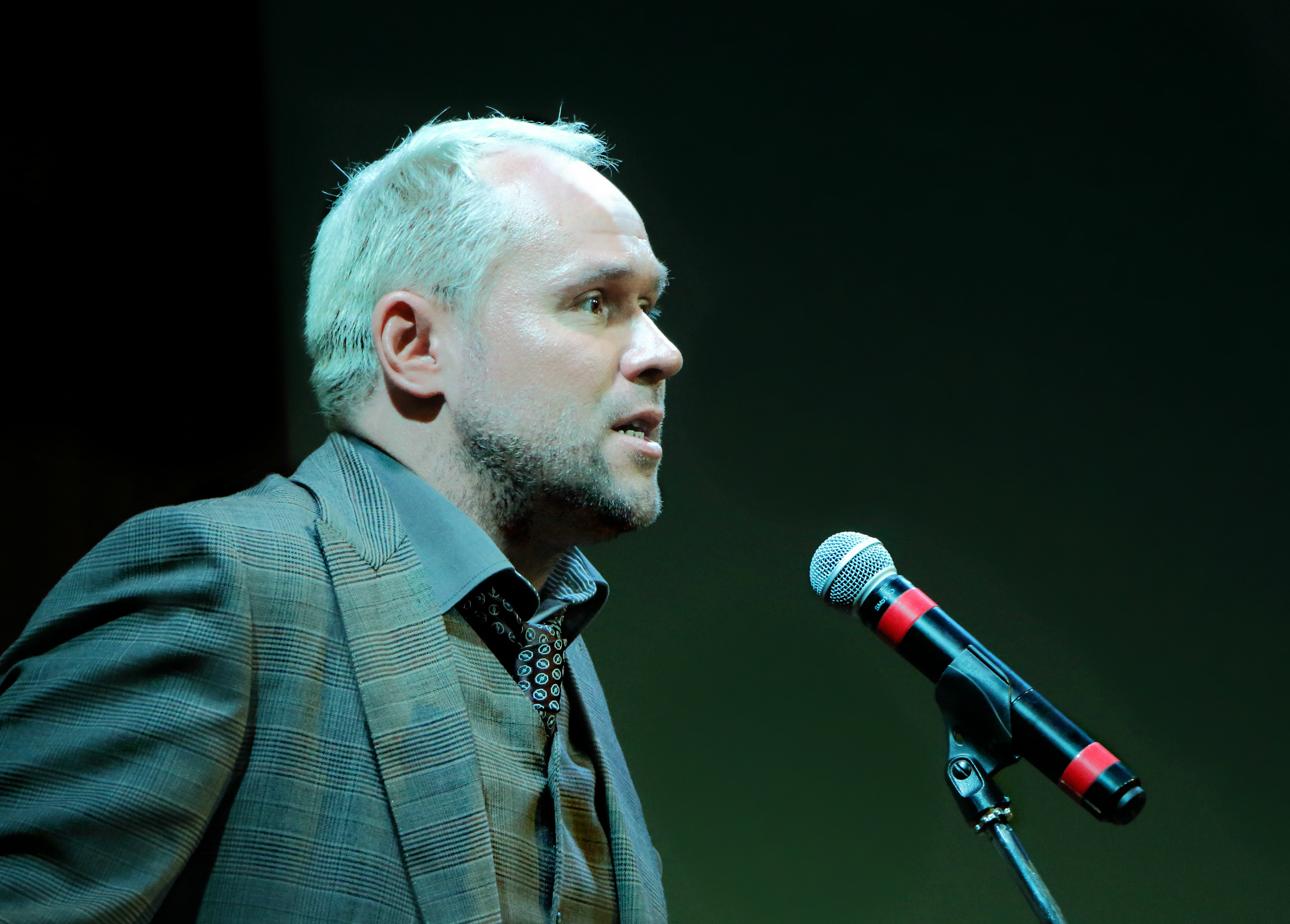 Максим Викторович Аверин- российский актёр театра, кино и телевидения, режиссёр, телеведущий. Заслуженный артист Российской Федерации. Читает стихи в Российской государственной детской библиотеке.